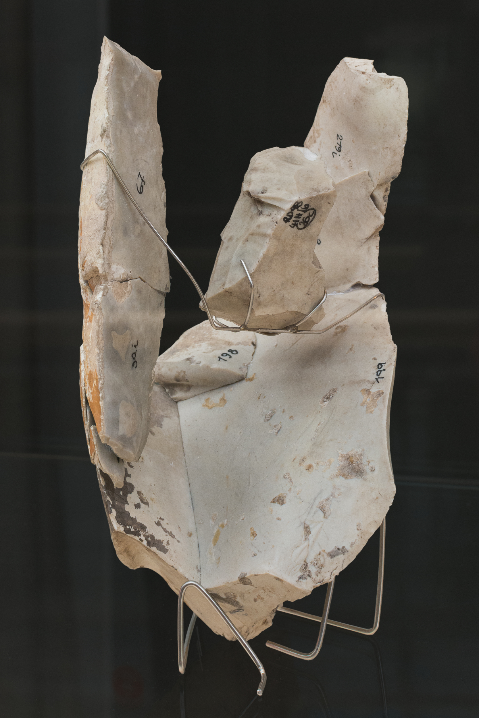 Kern und Nebenprodukte mit Cortex. Artefakte aus dem Abri Dalmeri (Riparo Dalmeri) bei Grigno im Trentino, Italien. Ausgestellt im MUSE, Museo delle Scienze in Trento.